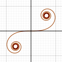 Cornu Spiral (aka Euler Spiral)